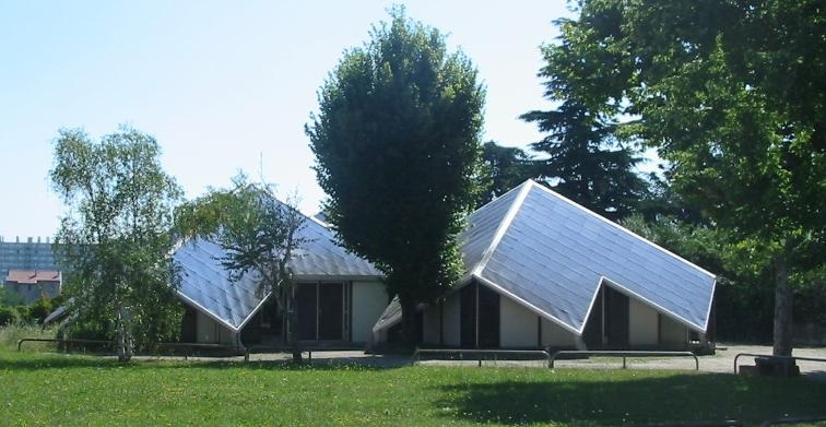 Photo du chalet de la MJC de Pierre-Bénite